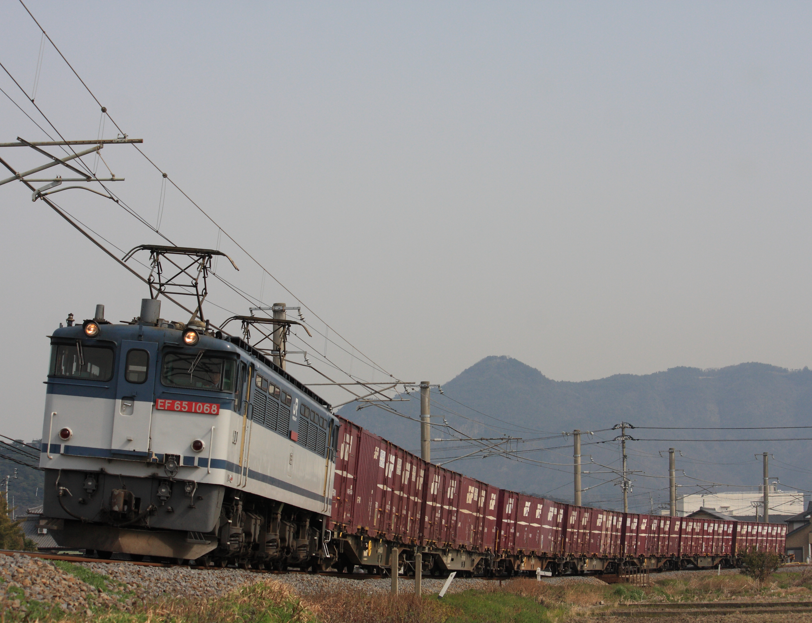 JR貨物EF65形電気機関車1068号機 予讃線・観音寺-豊浜